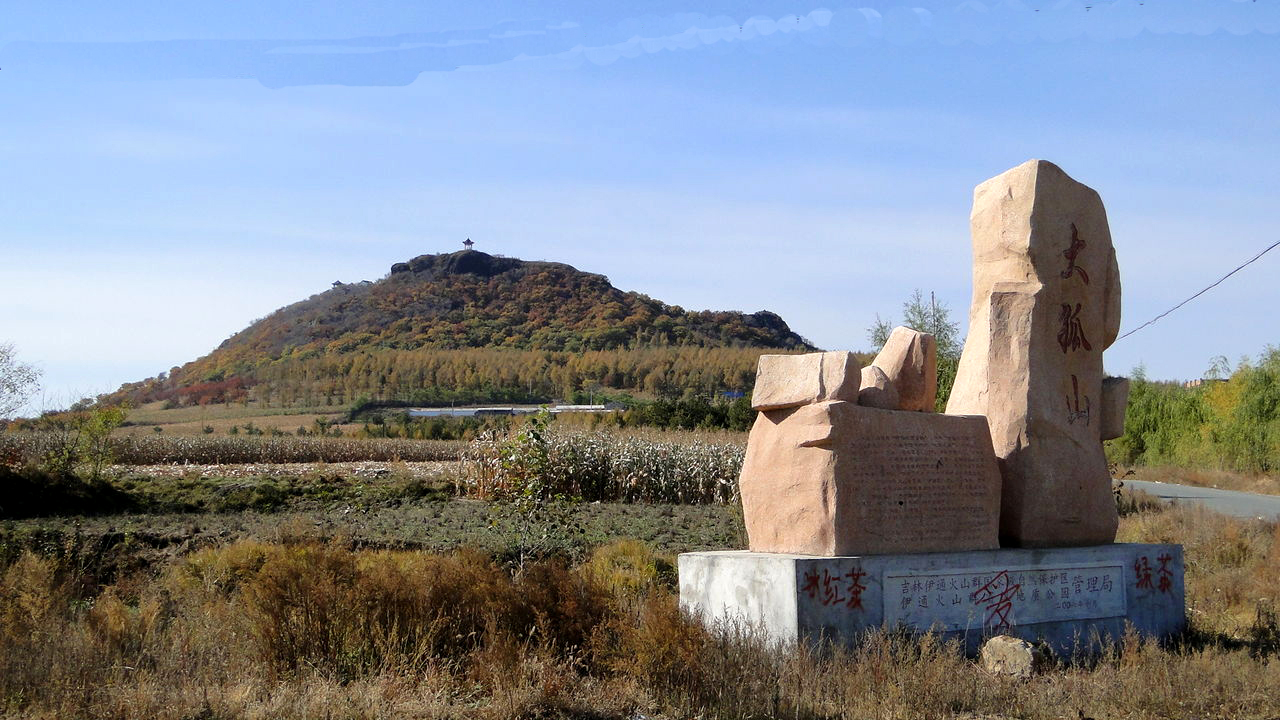 中国吉林省伊通满族自治县大孤山（伊通火山群的一部分）